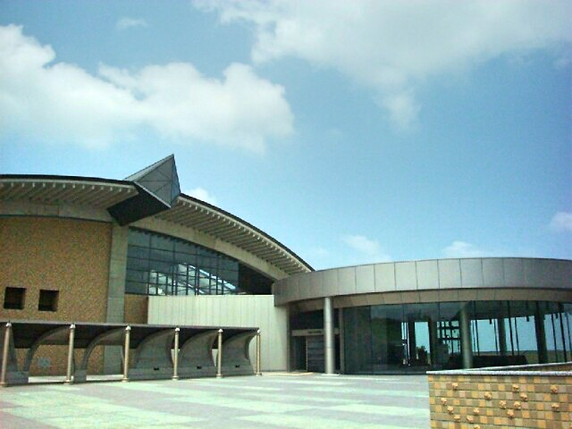 本人が撮影 Niigata Prefectural Museum of History, Nagaoka, Niigata, Japan